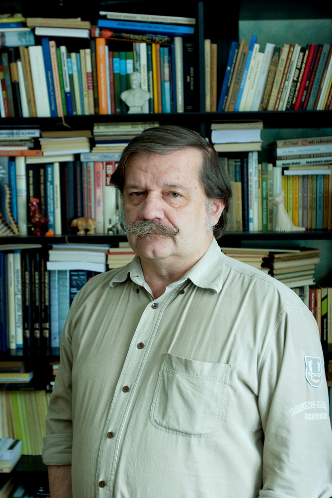 Kirjamees Peeter Olesk Tartus, Kreutzwaldi tänaval.